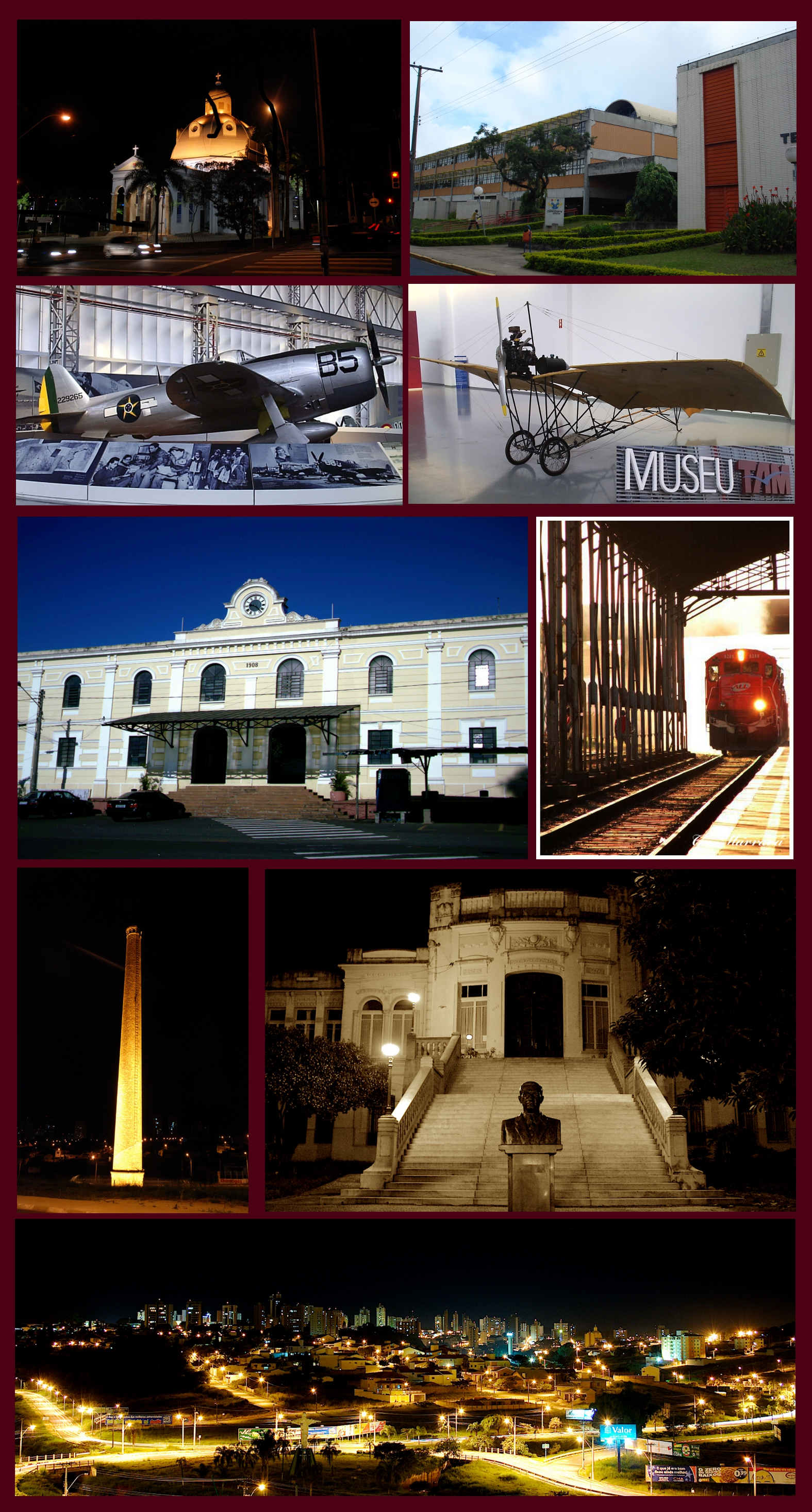 Cidade de São Carlos no estado de São Paulo, Brasil (a partir de cima, esquerda): Catedral de São Carlos, UFSCar, P-47D Thunderbolt e Demoiselle 22 (do Museu Asas de um Sonho), Estação Ferroviária de São Carlos, Parque da Chaminé, Escola Álvaro Guião e um panorama da cidade